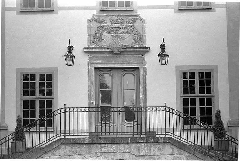 Gårdsportal. Motiv: Salsta slott Nyckelord: Byggnadsminnen:Statl Kategori: Slott Gårdsportal.